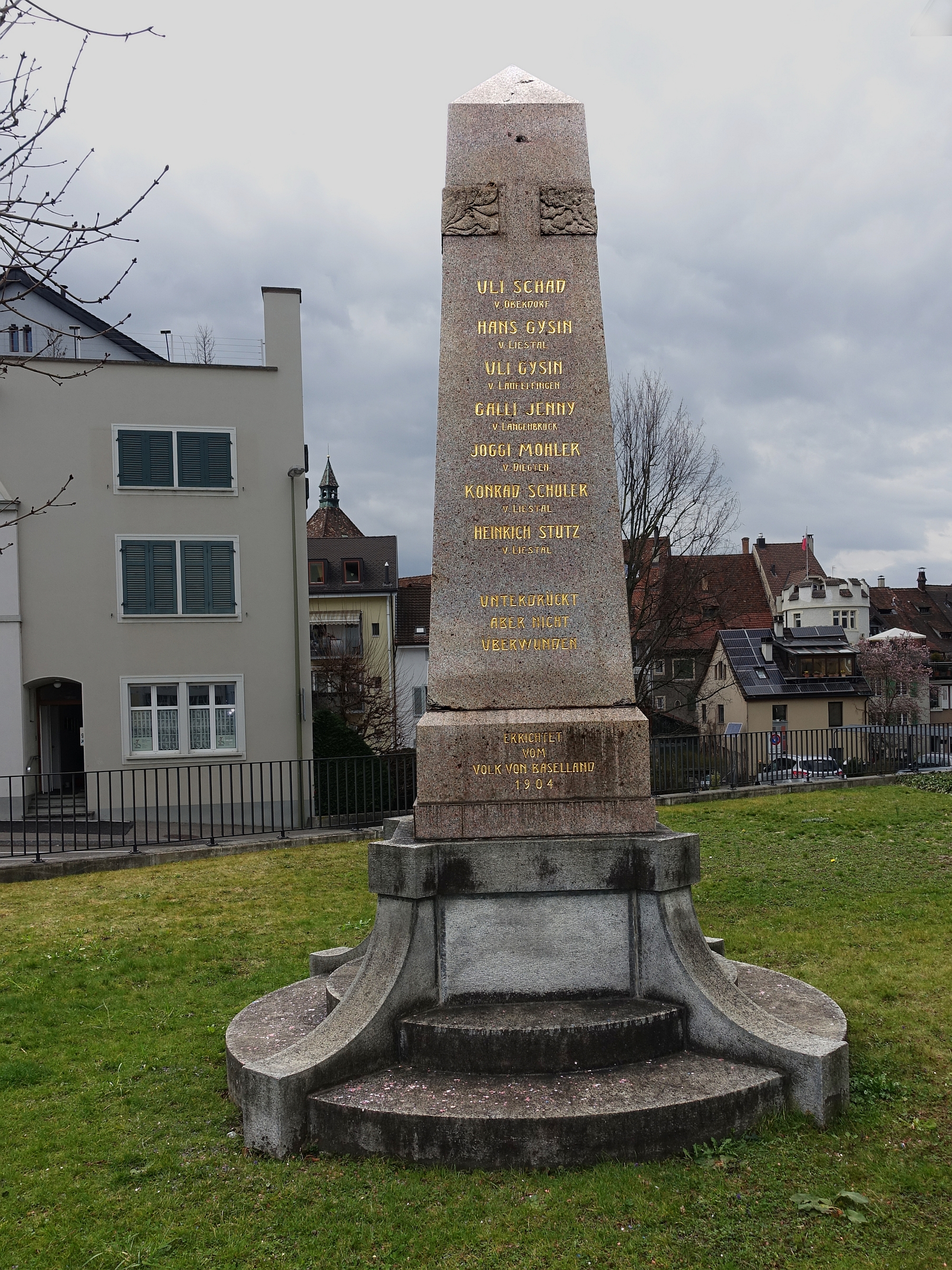 Obelisk-Bauernkriegsdenkmal von 1904, vor der Kaserne in Liestal, Schweiz. Inschrift: Uli Schad von Oberdorf, Hans Gysin von Liestal, Uli Gysin Läufelfingen, Galli Jenny von Langenbruck, Joggi Mohler von Diegten, Konrad Schuler von Liestal, Heinrich Stutz von Liestal. Unterdrückt aber nicht überwunden. Errichtet vom Volk von Baselland 1904. Inschrift auf der anderen Seite: Dem Andenken an die am 24. Juli 1653 für das Volk gestorbenen (Hingerichteten!) Baselbieter. Inschrift auf der anderen Seite.